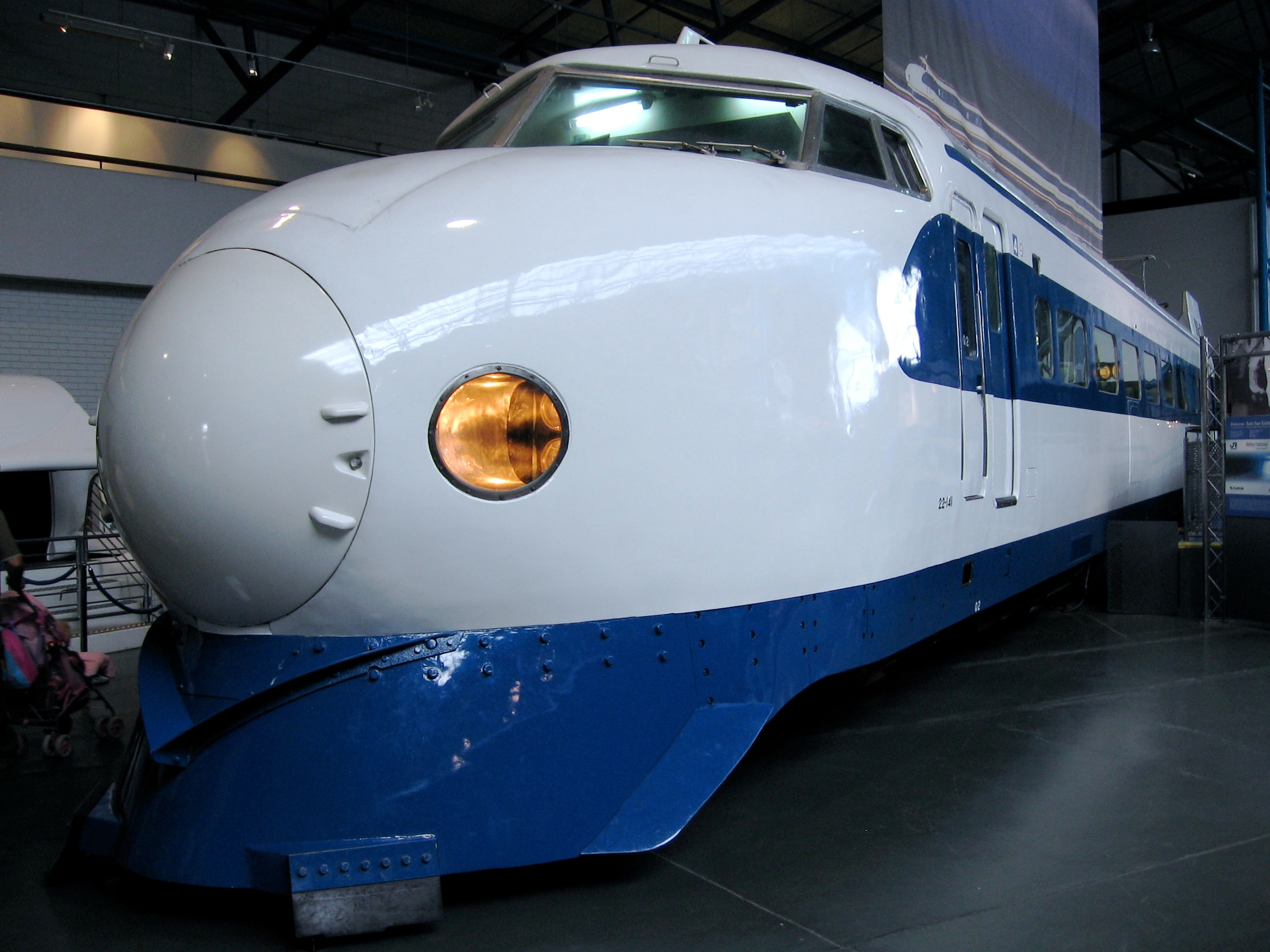 Shinkansen 0 Series